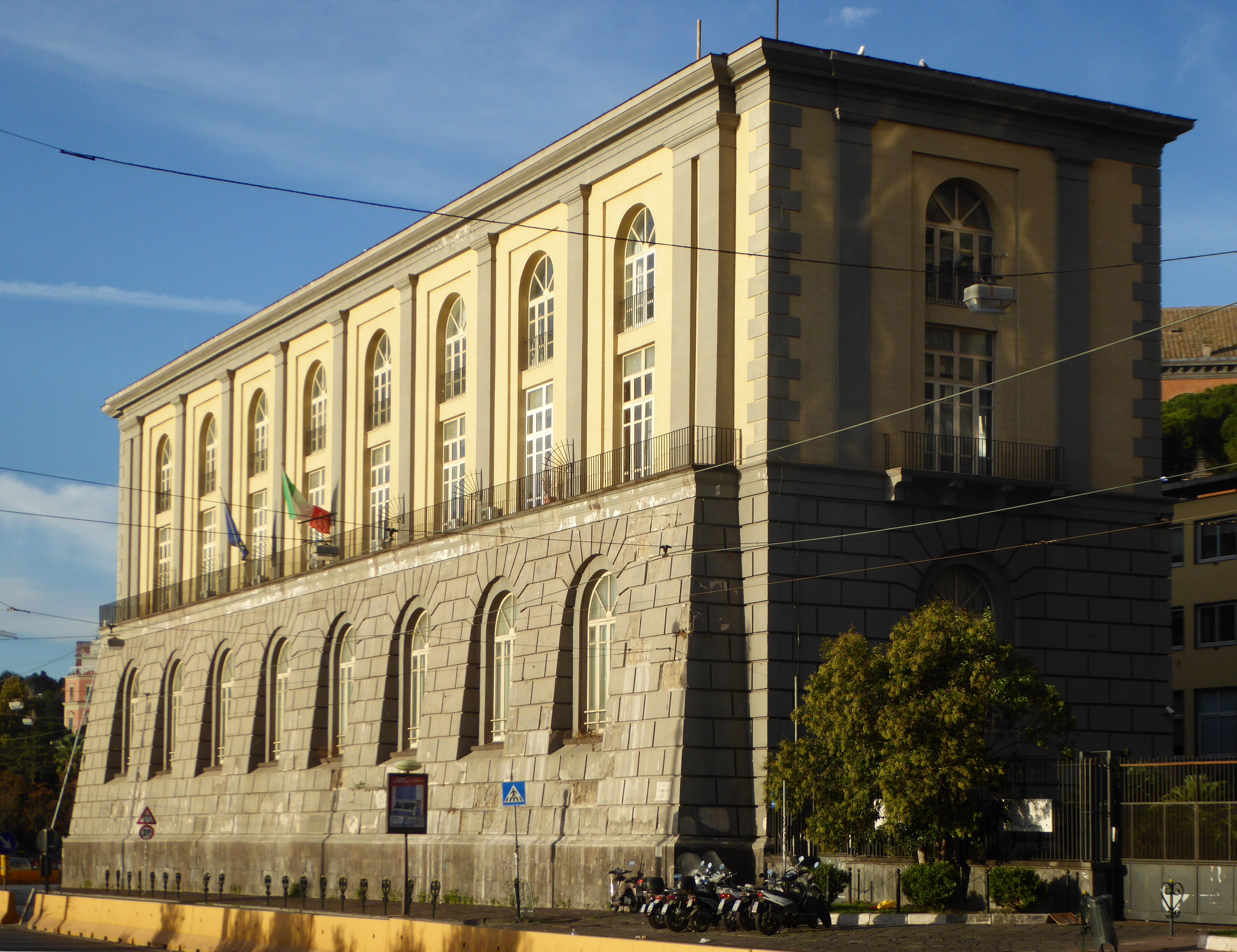 Neapel (IT), Parthenope-Universität, Palazzina Spagnola.